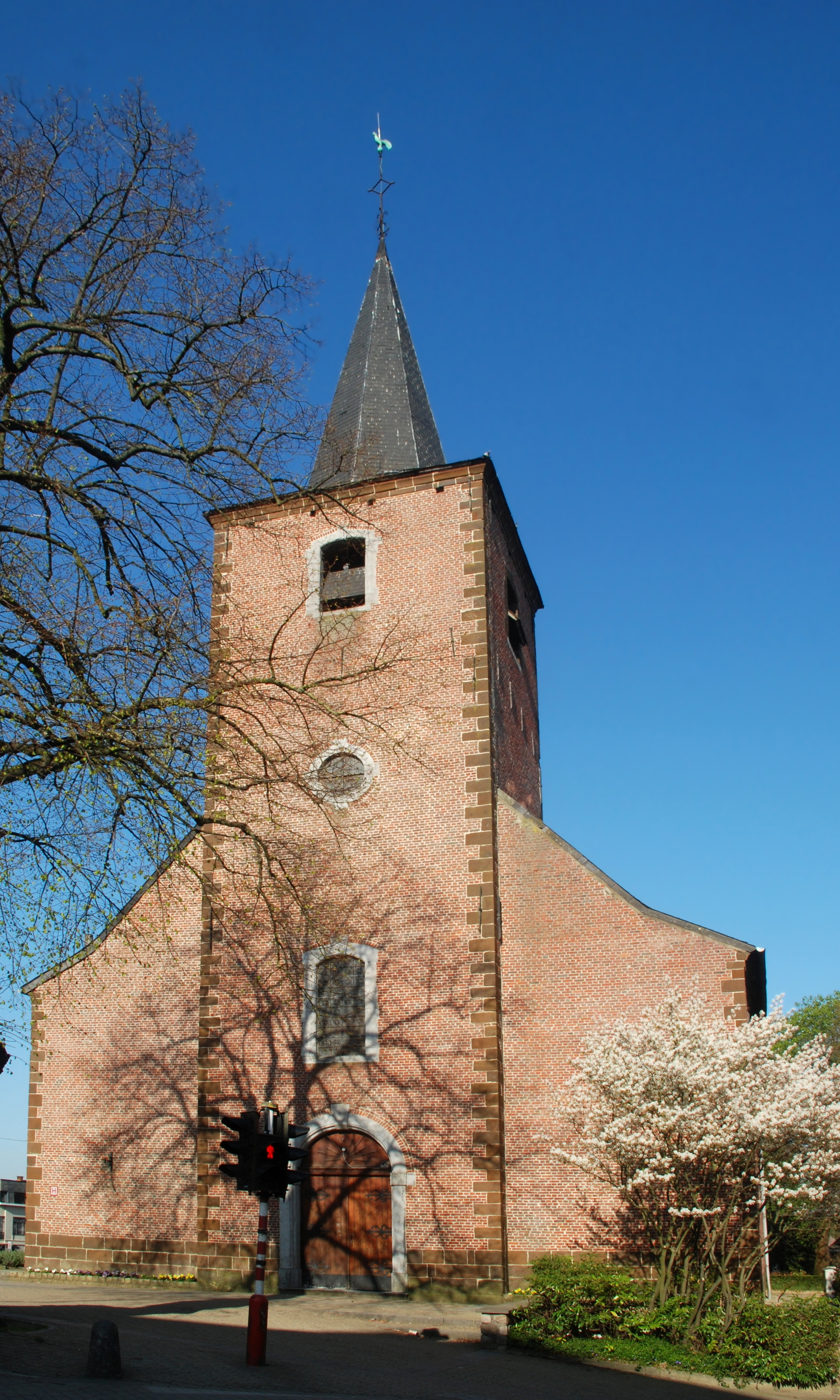 Belgique - Brabant wallon - Ottignies - Église Saint-Rémi